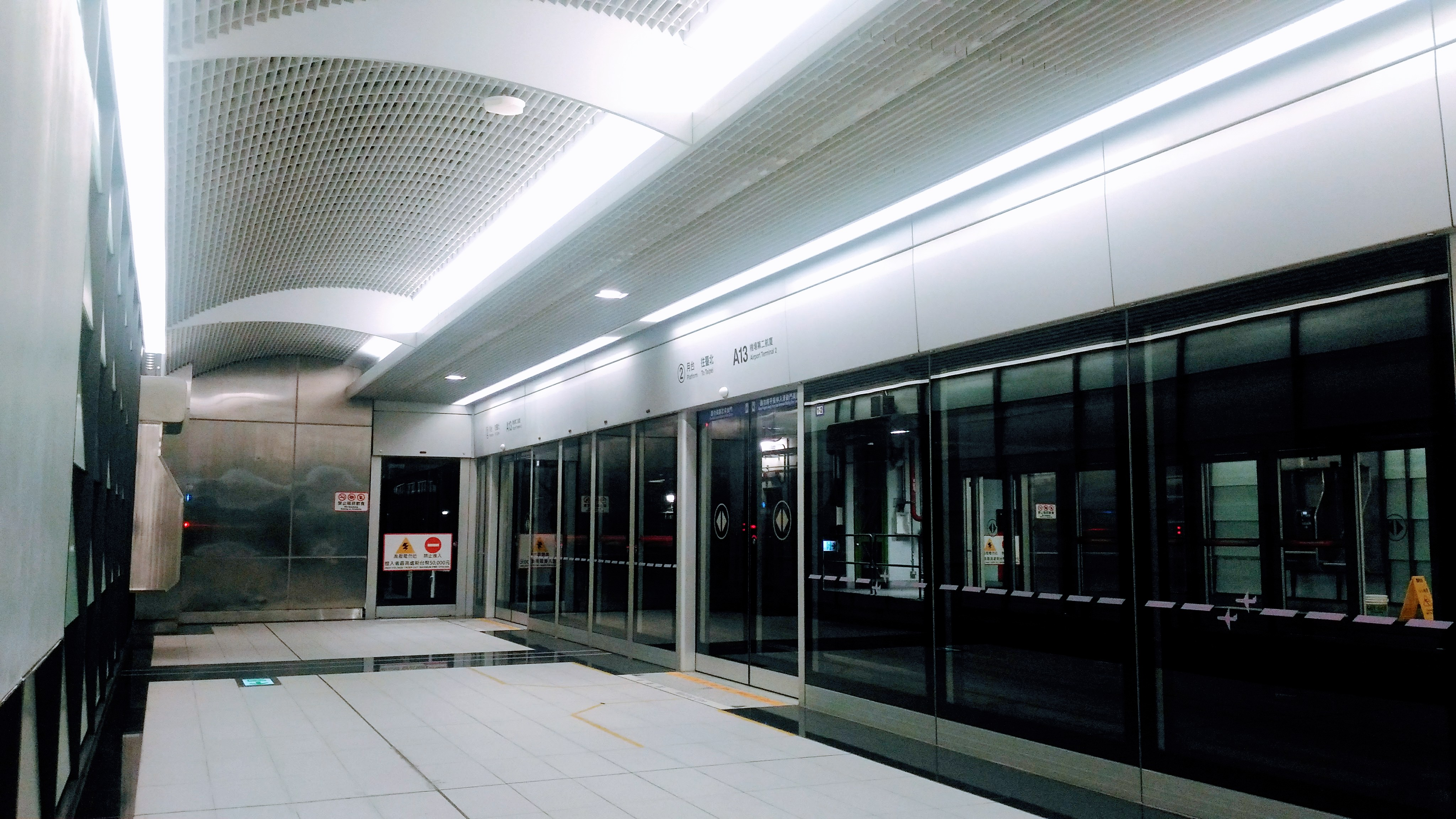 中文（台灣）: 桃園國際機場捷運機場第二航廈站第二月台。